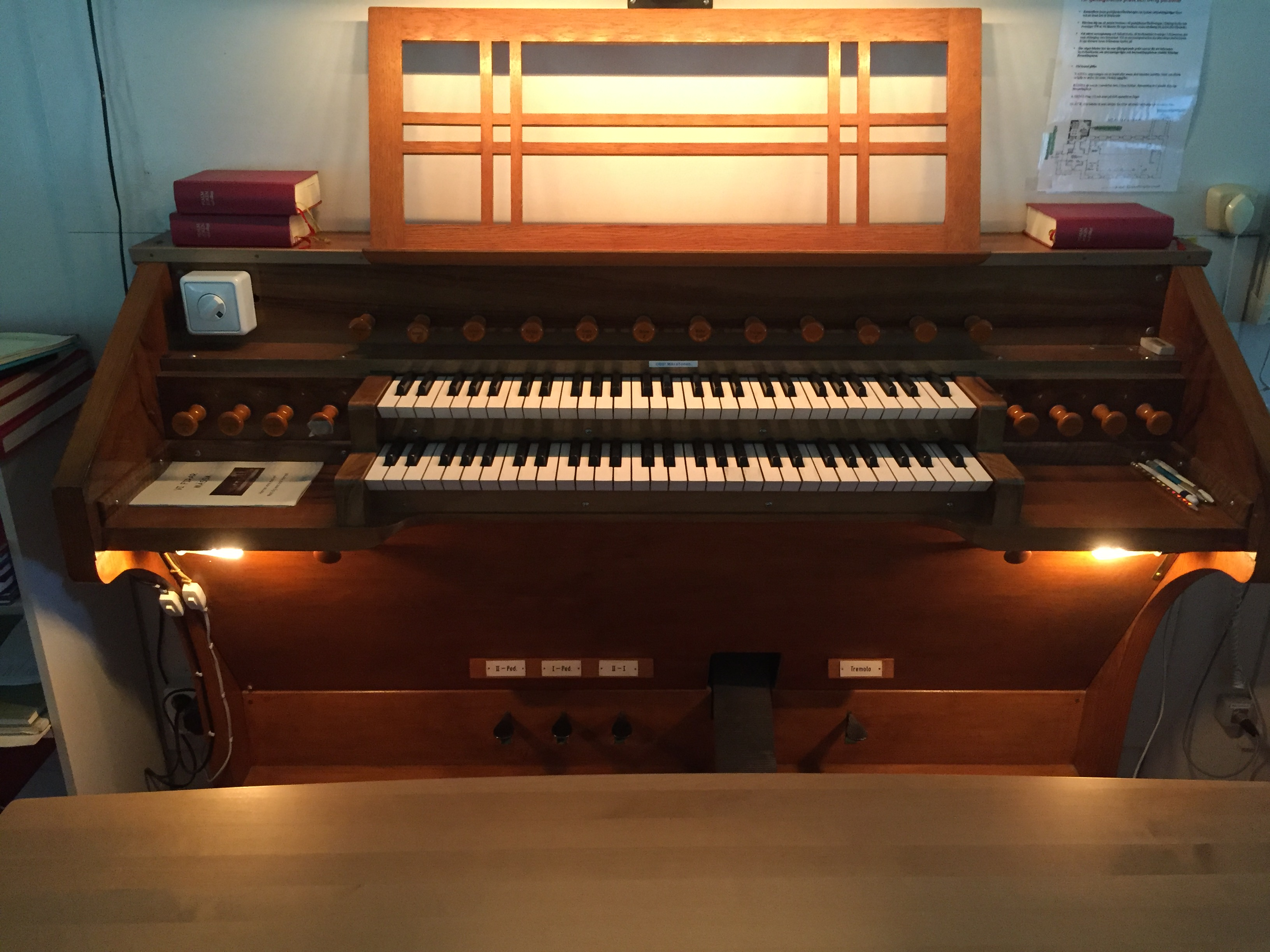 Köpings kyrka, Öland. Läktarorgelns spelbord.